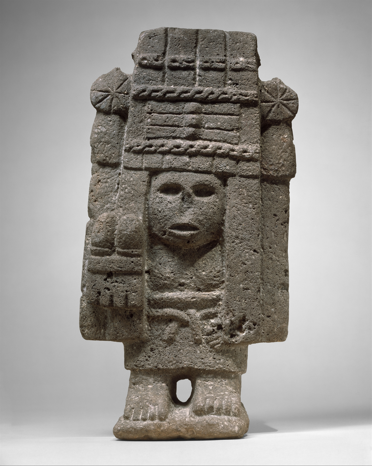 Aztec; Figure; Stone-Sculpture